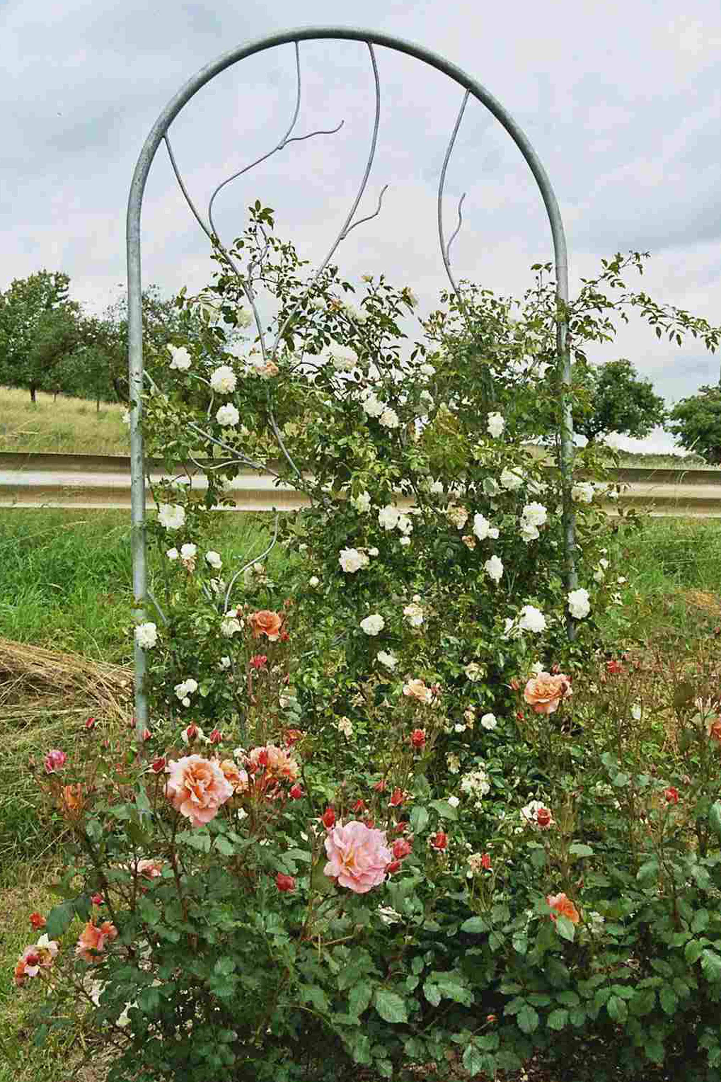 Rosenstrauch im Rosendorf Löhndorf